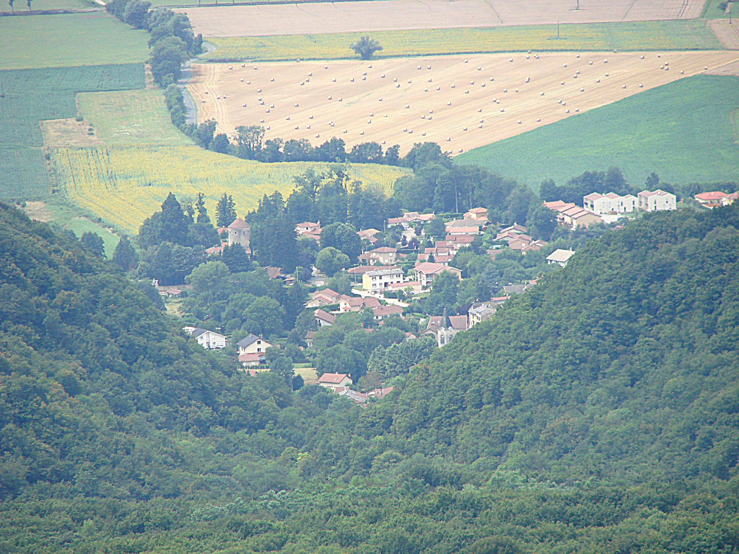 Douvres (Ain), vue du Mont Luisandre